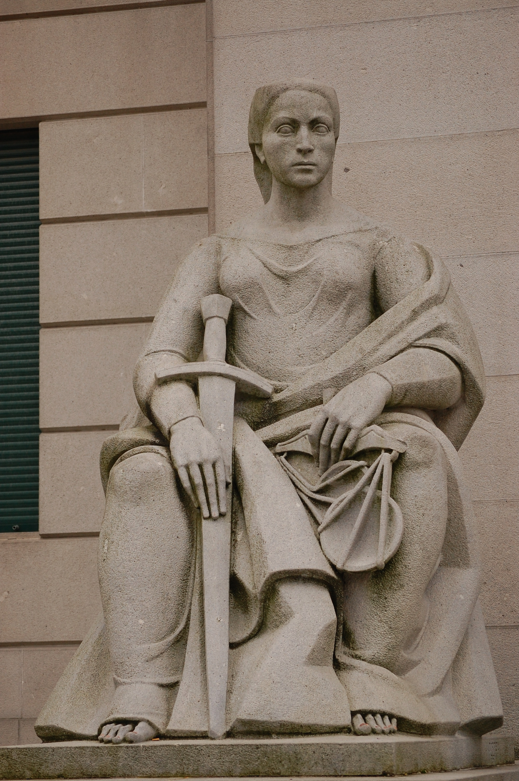 Joaquim Correia, Justiça. Estátua no exterior do Palácio de Justiça de Guimarães.